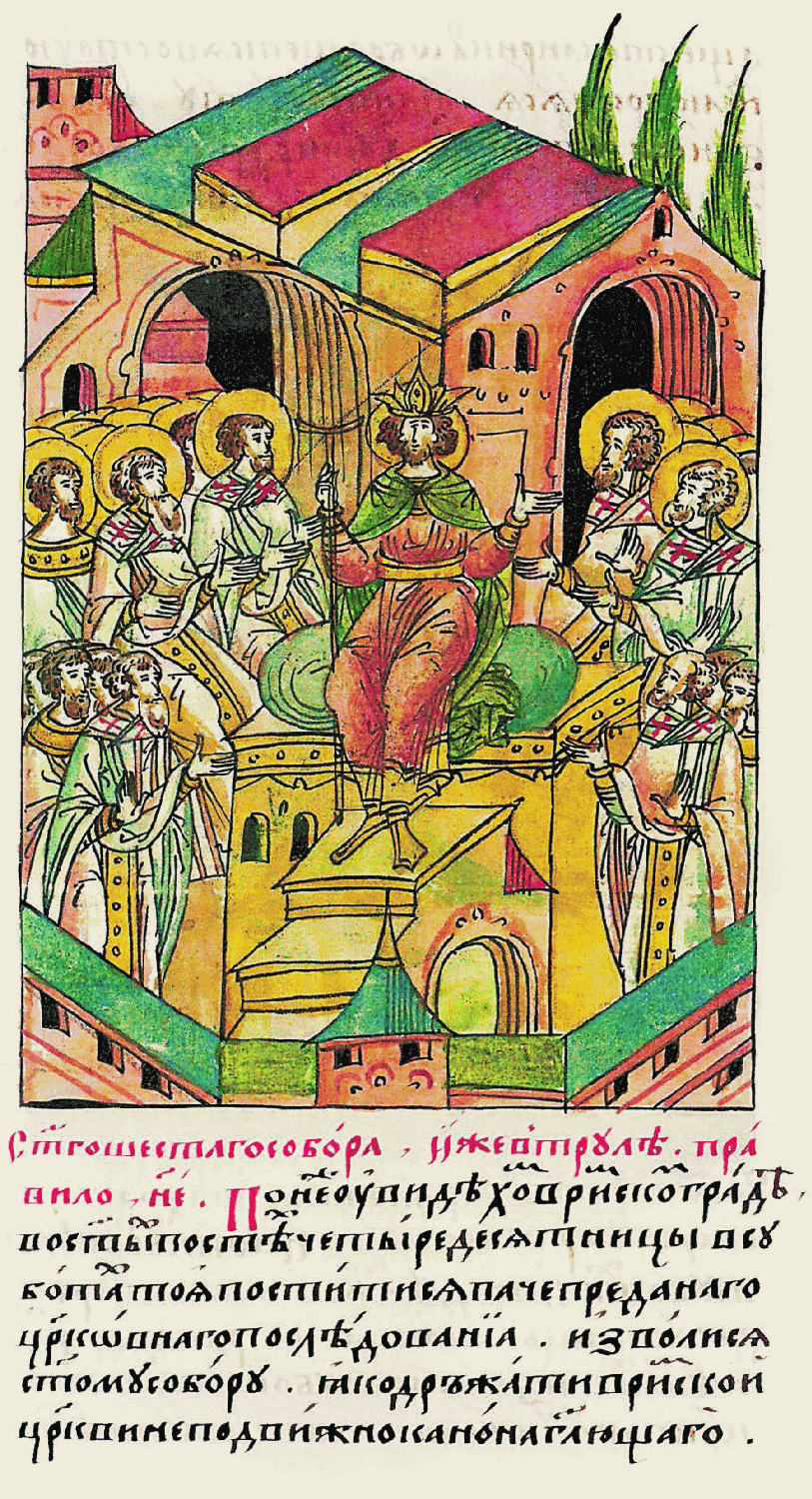 Святого шестого Трулльского собора правило 55-е. «По- скольку мы узнали, что живущие в Риме в святой пост Четы- редесятницы в суббо- ты постятся вопреки полученному церков- ному последованию, то святой собор решил, чтобы в Римской церк- ви нерушимо при- держивались канона, говорящего: 444 Этого же собора правило 56-е. «Также узнали мы, что в Ар- мянской стране и в других странах в суб- боты и в воскресенья святой Четыредесят- ницы некоторые люди употребляют в пищу яйца и сыры, за благо же признано, что церковь Божья во всей вселенной, «Если увидят кого- либо из клириков постящимся в Святую неделю или в суббо- ту, кроме одной, то будет извержен, если же мирянин, то будет отлучен».